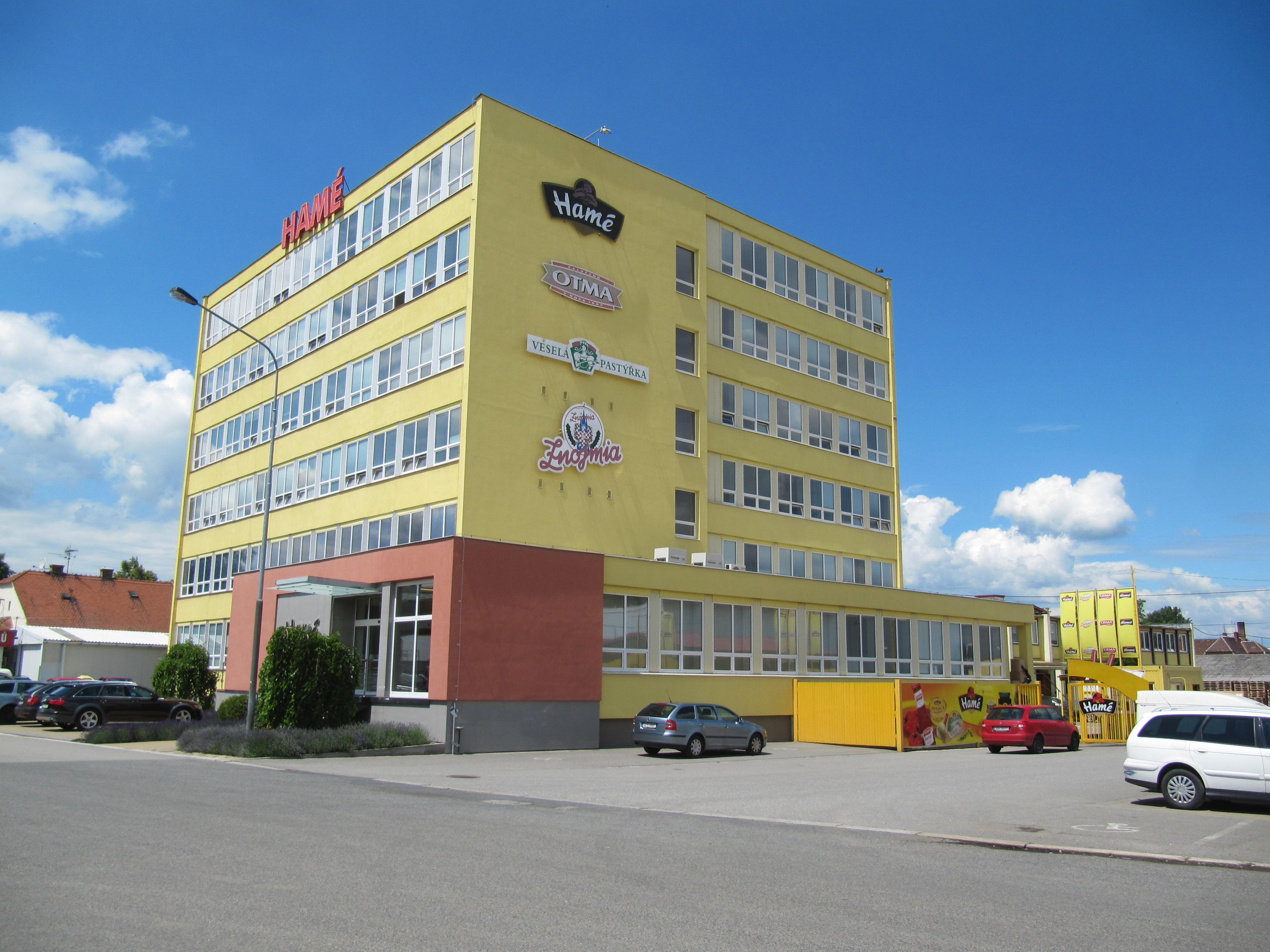 Kunovice, Hamé